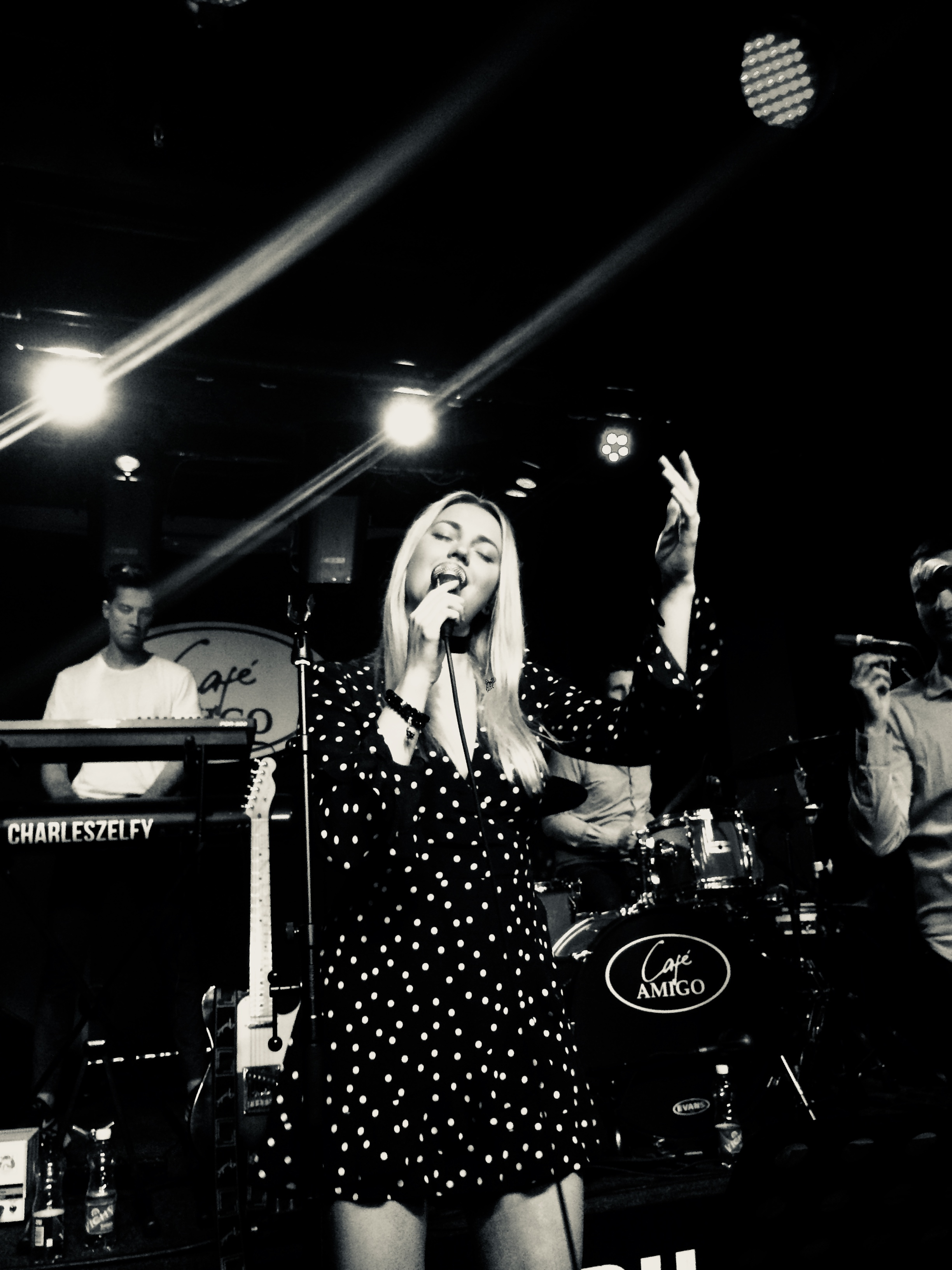 Kerli Kivilaan